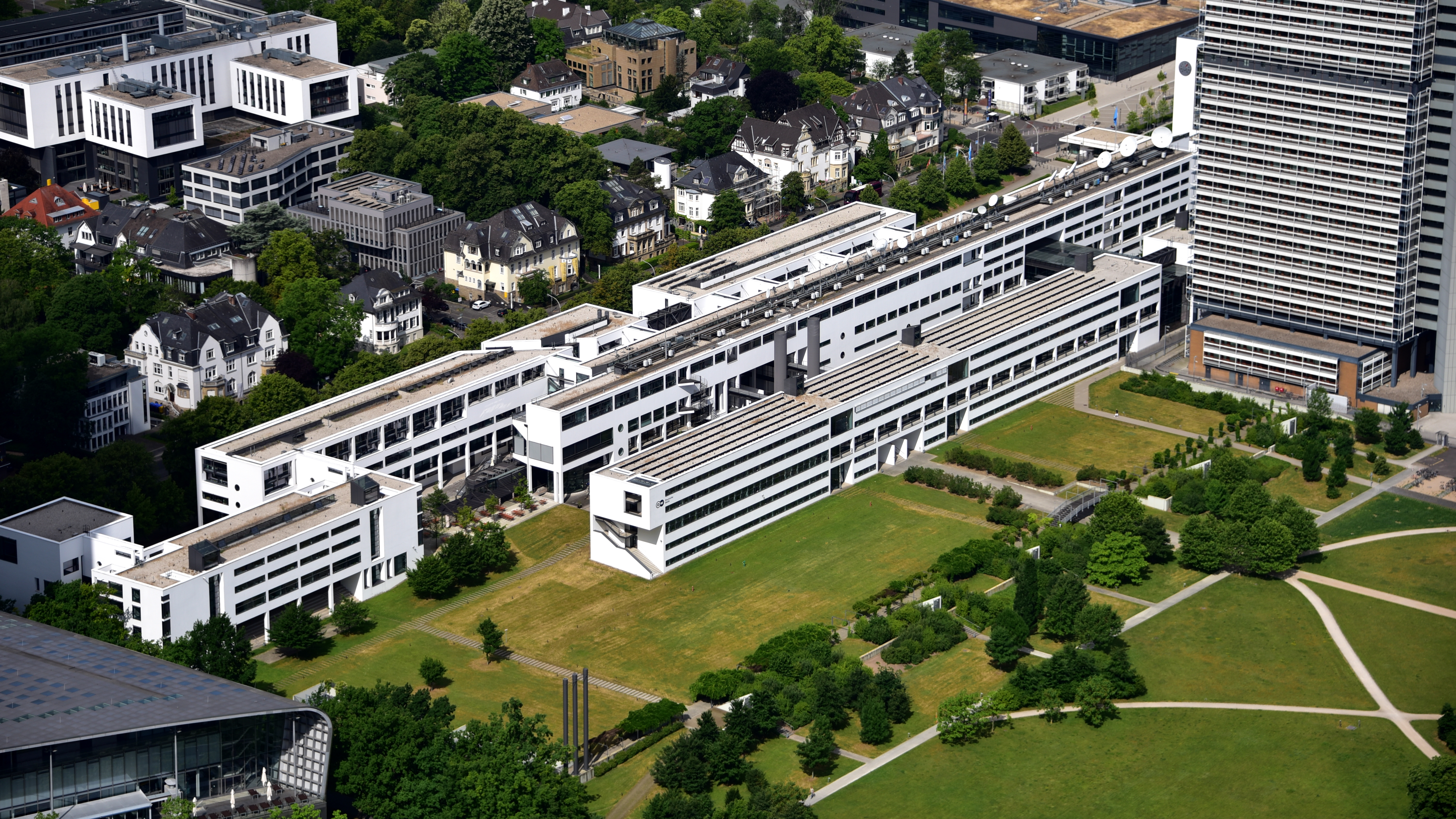 Bonn, Deutsche Welle (Schürmann-Bau), Luftaufnahme (2017); am unteren linken Bildrand das Sockelgeschoss des Post Towers und am oberen rechten der Lange Eugen